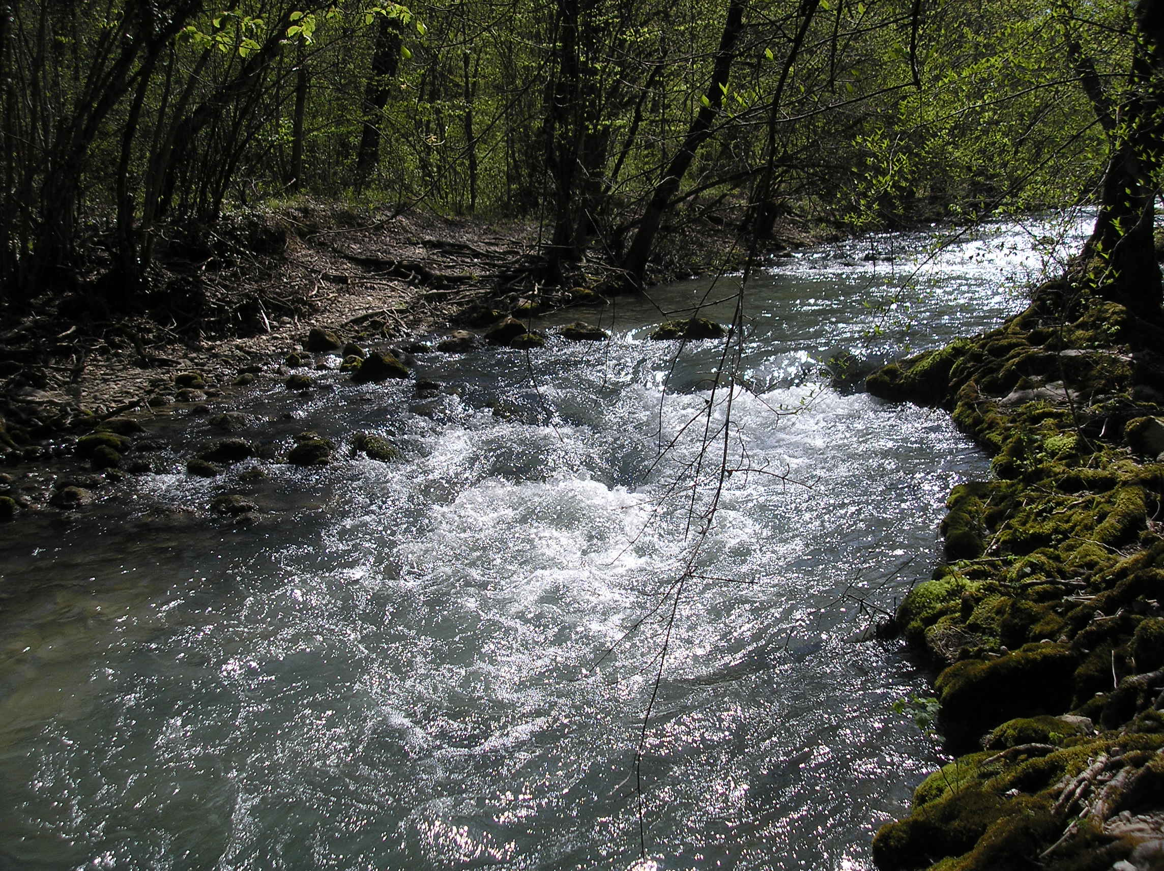 Річка Чорна